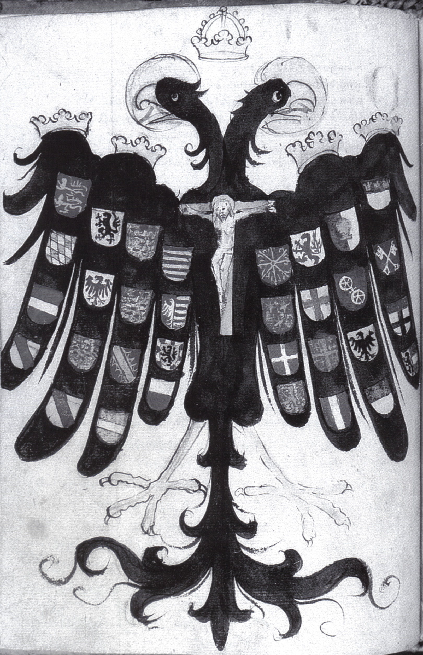 Quaternionenadler aus der Handschrift "Agrippina" von Heinrich van Beeck, Köln, 15. Jh